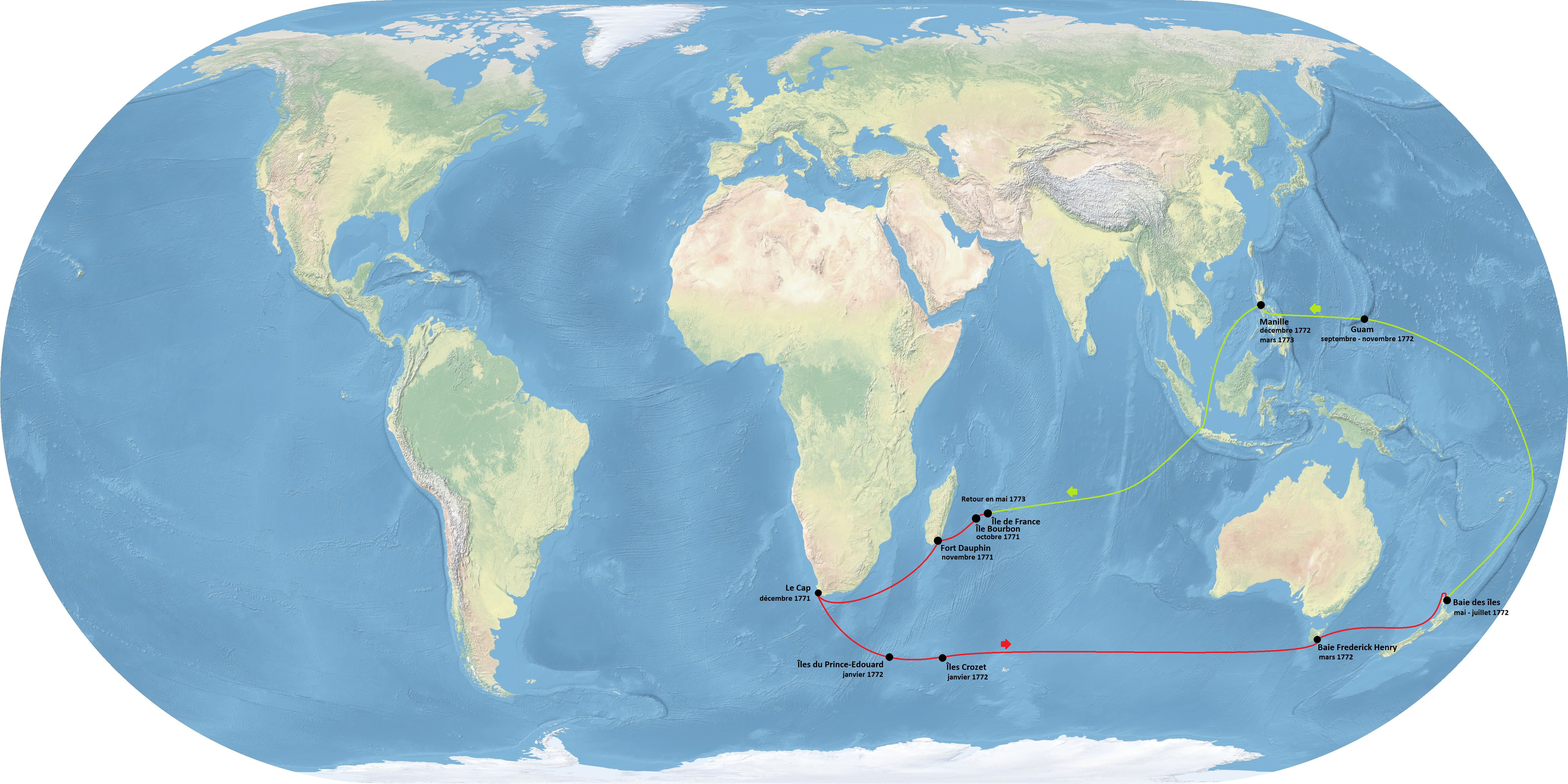 Trajet des navires Mascarin et du Marquis-de-Castries entre 1771 et 1773. Le Mascarin est mené par Marion-Dufresne jusqu'à son assassinat en Baie des îles le 12 juin 1772, puis par Julien Crozet. Le Marquis-de-Castries est commandé par Duclesmeur. Les deux navires naviguent groupés du départ jusqu'à Manille, où ils se séparent, la date de retour indiquée est celle du dernier bateau arrivé, le Mascarin.